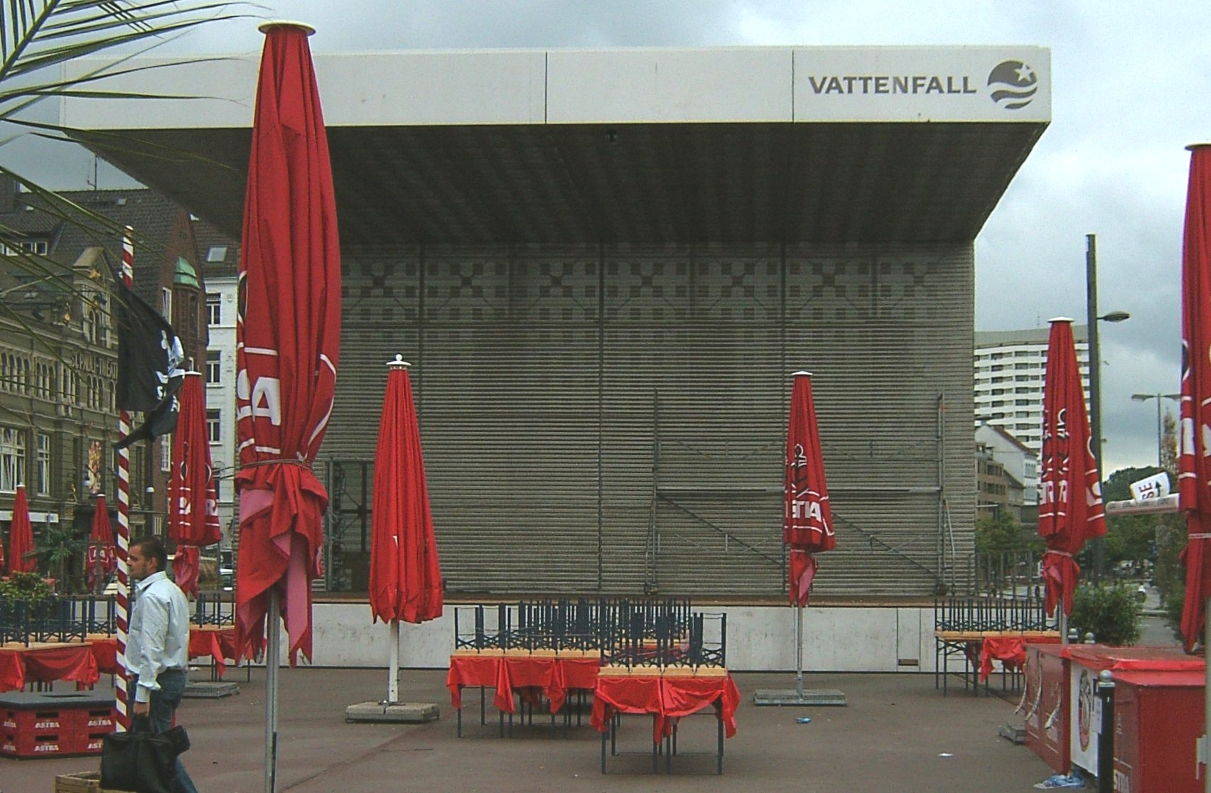 Freilichtbühne auf dem Spielbudenplatz auf St. Pauli.